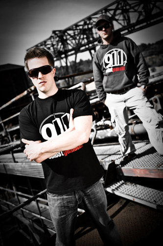 Die Bandbreite, Band Pressefoto